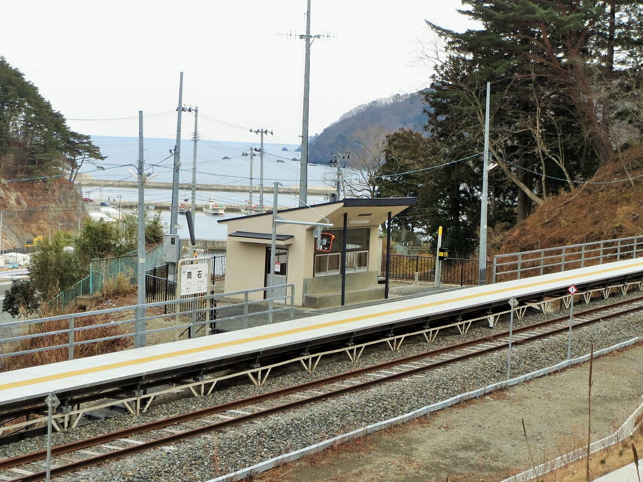 復旧後の両石駅 Canon IXY 3